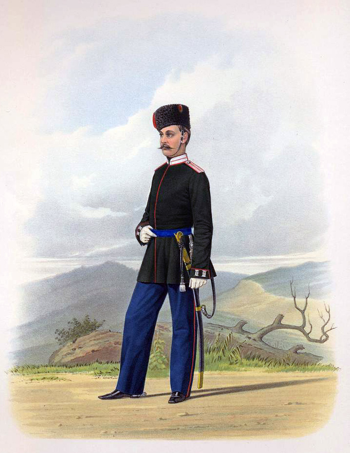 Гражданский чиновник Донского Войска, 30 сентября 1867. (В парадной форме).